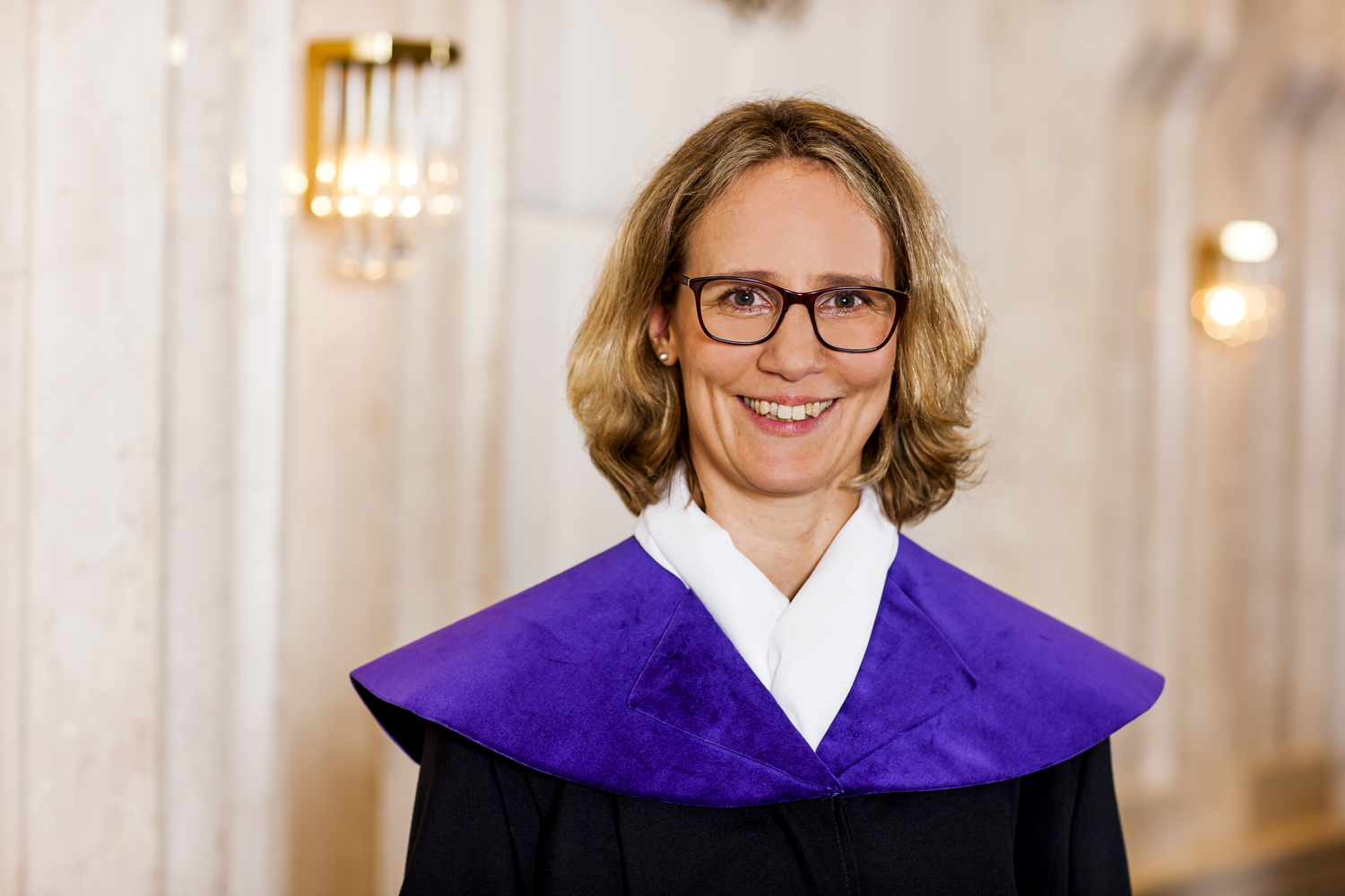 Dr. Angela Julcher, Ersatzmitglied des österreichischen Verfassungsgerichtshofs seit 2015.